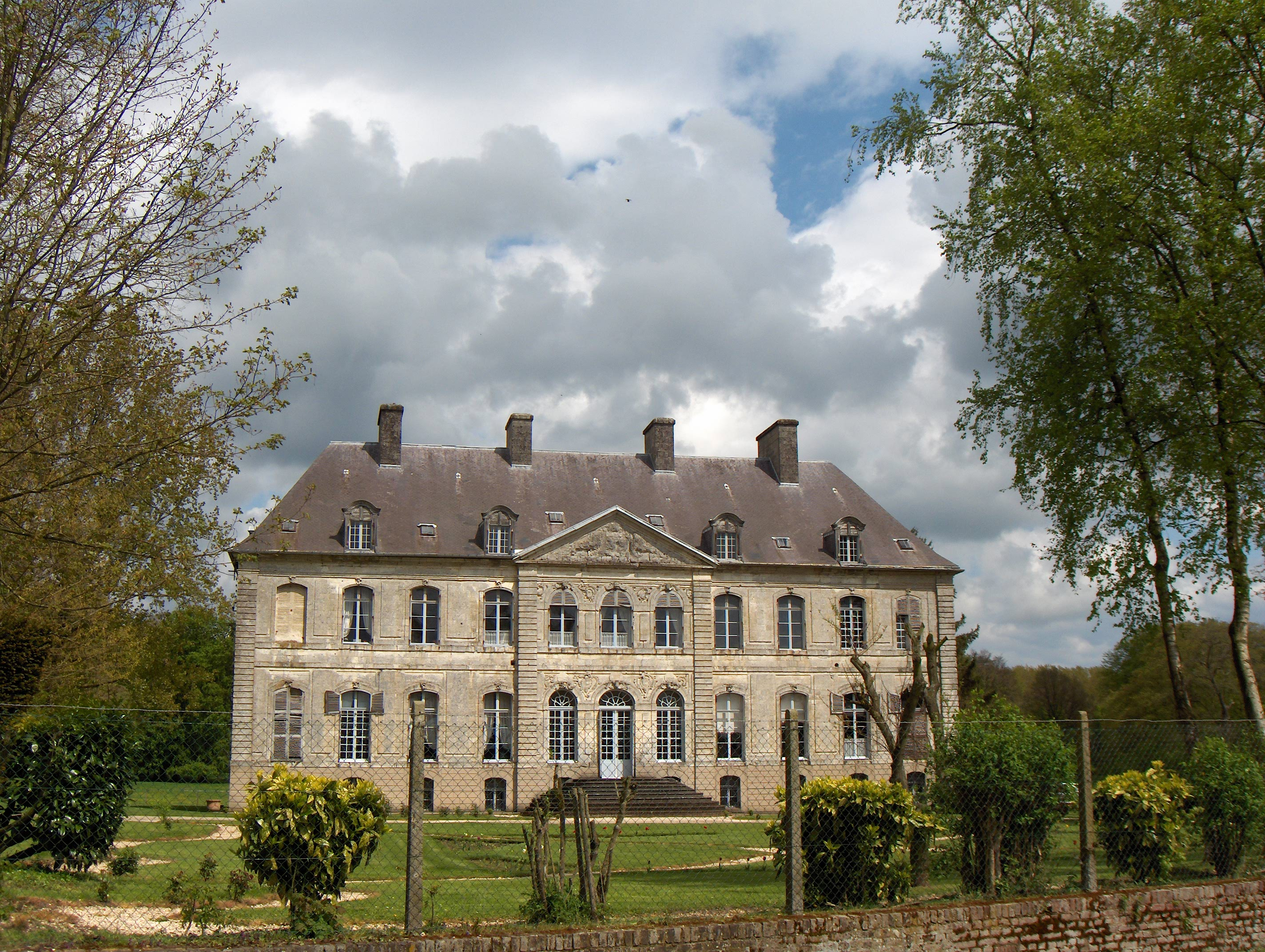 Château de Couin (dépt. Pas-de-Calais), datant de 1747